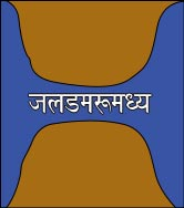 Strait